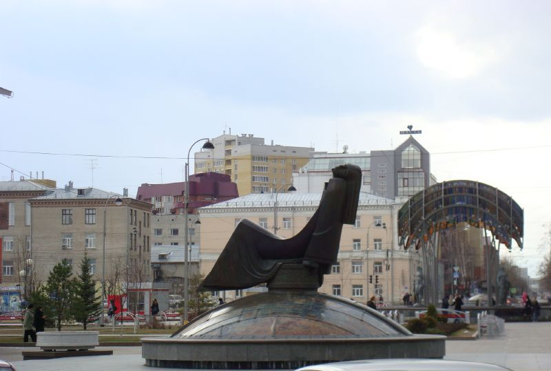 Памятник «Земной шар» на Цветном (Пешеходном) бульваре в Тюмени